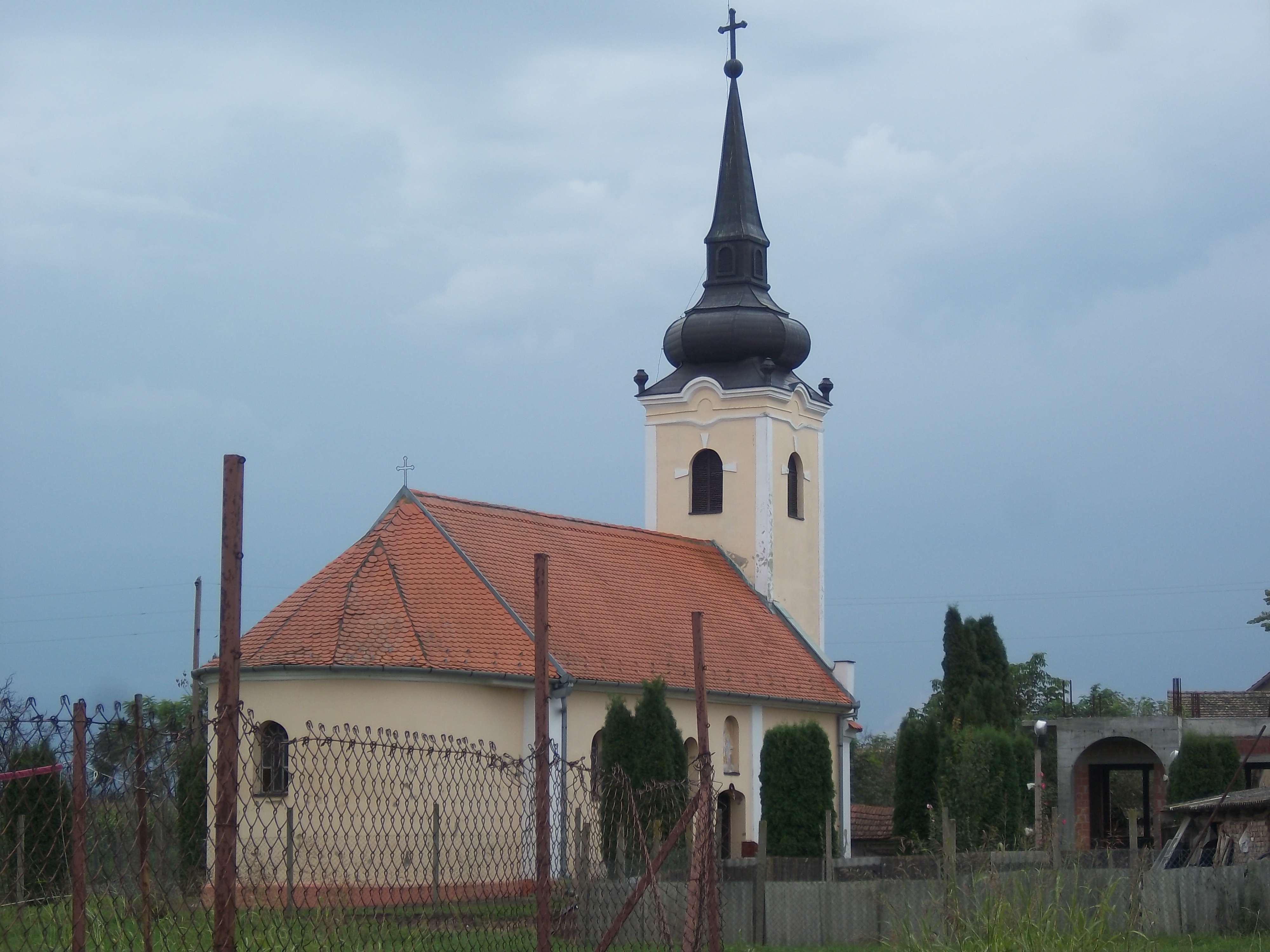 Српски (ћирилица): Насеље Вера у Општини Трпиња у источној Хрватској.